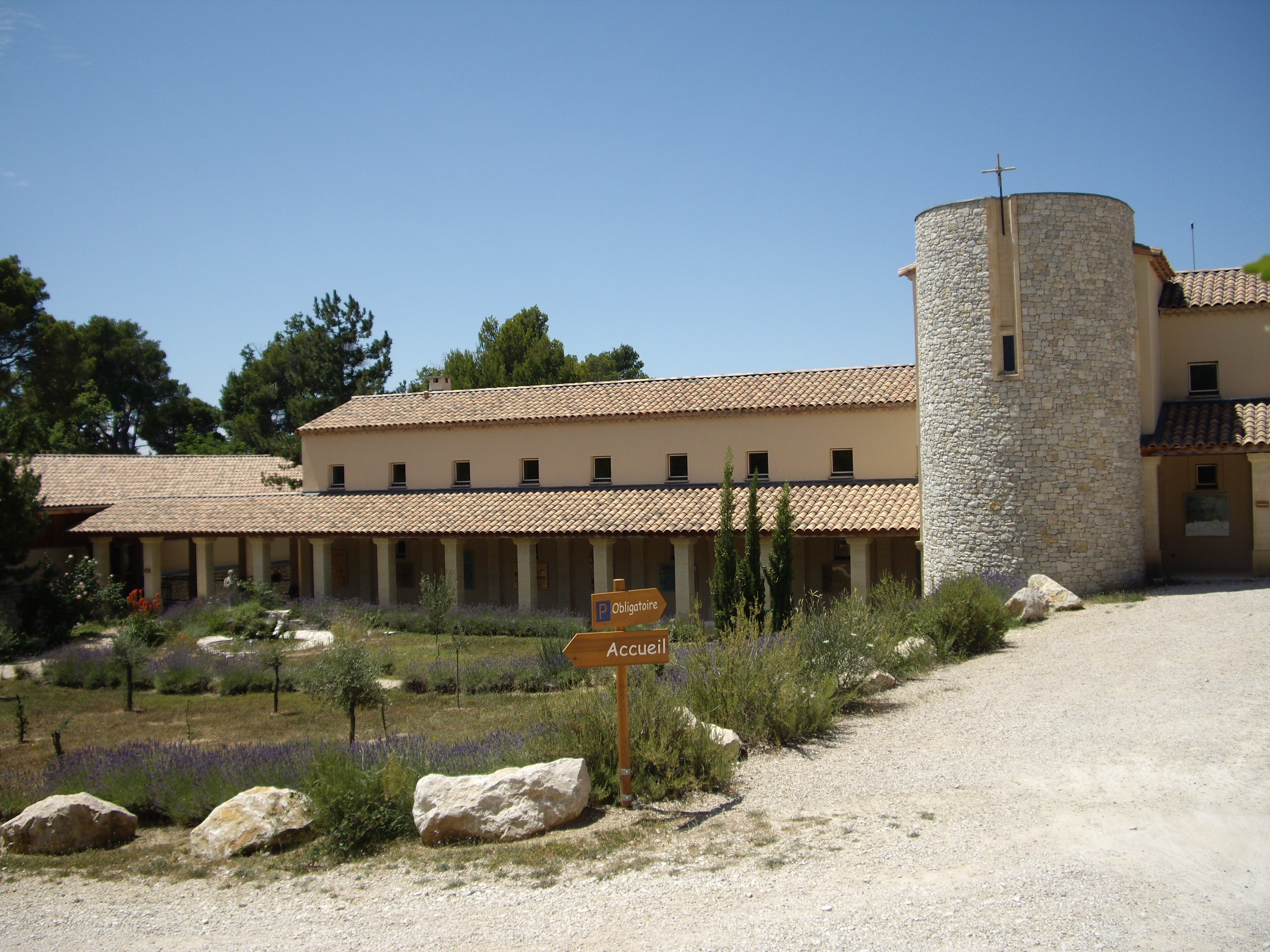 Abbaye Notre-Dame den Bon-Secour